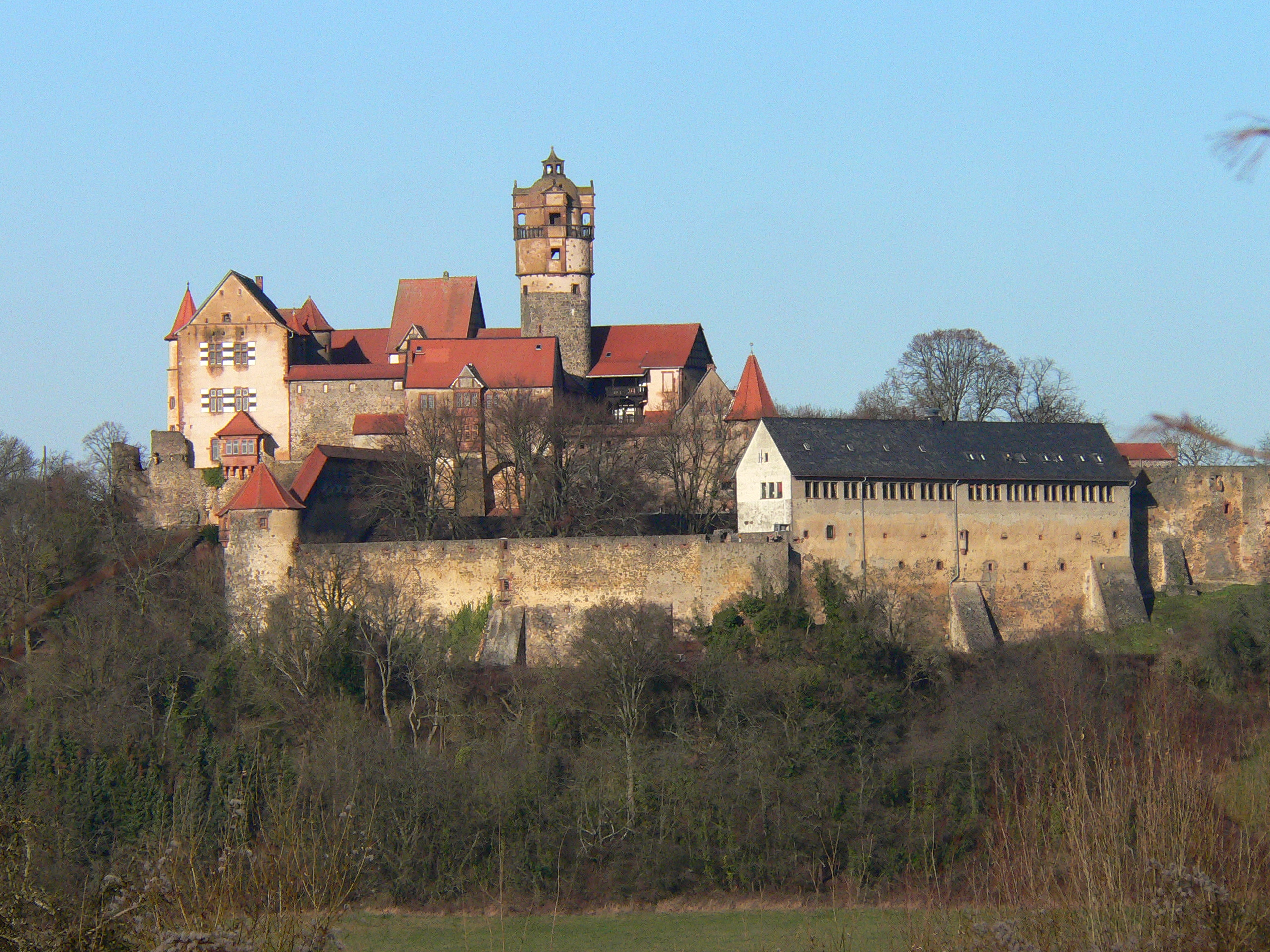 Ronneburg (Deutschland, Hessen) Südostansicht